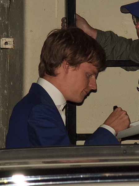 Toronto International Film Festival 2016